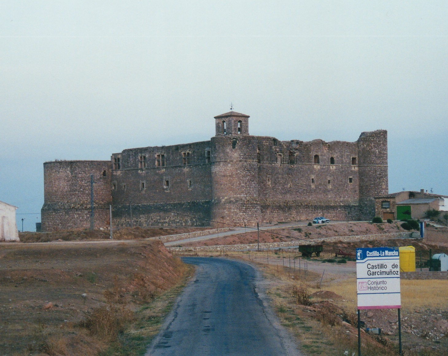 Castillo de Garcimuñoz, en Cuenca (España)